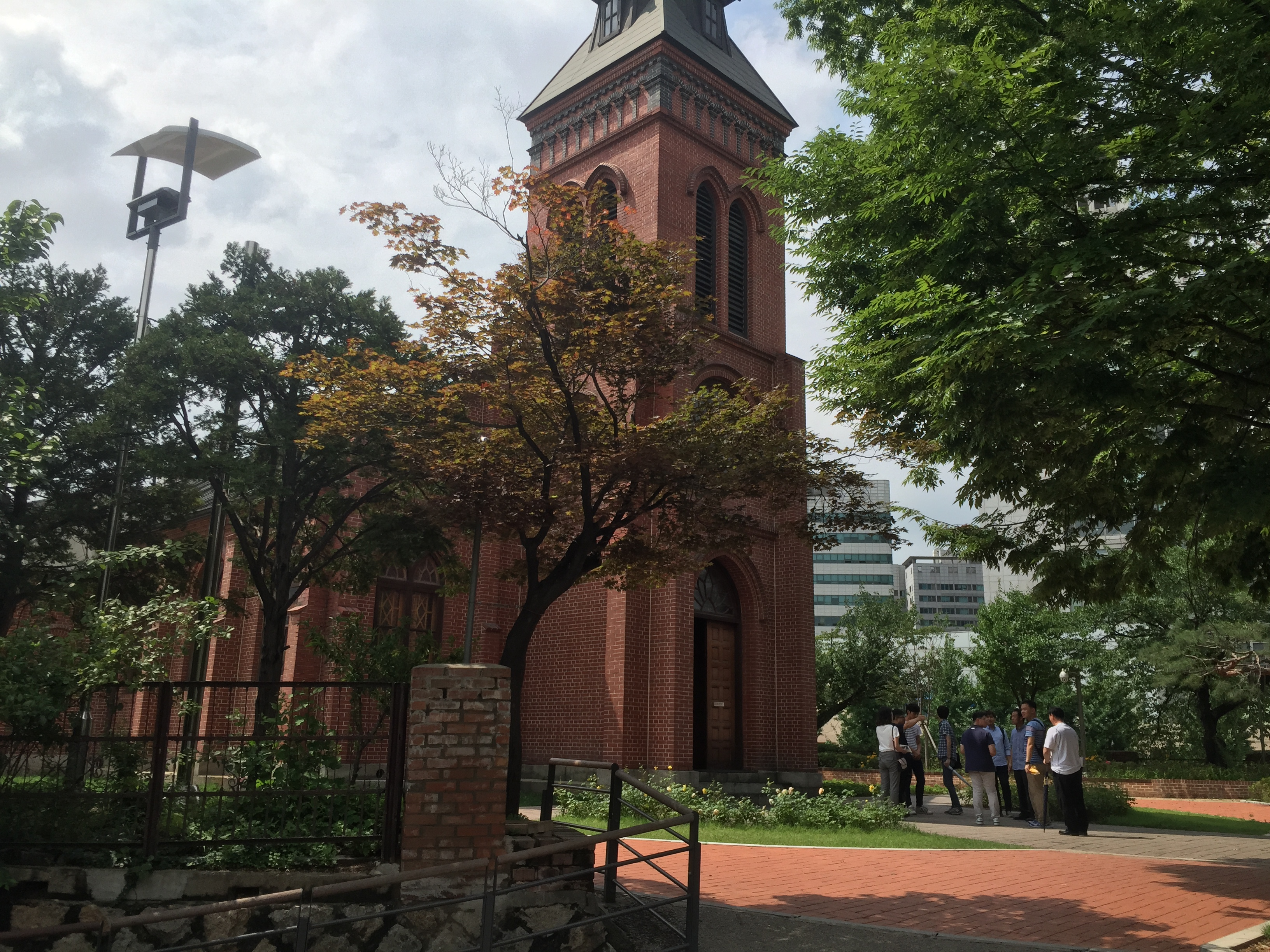 천주교 서울대교구 중림동 약현성당